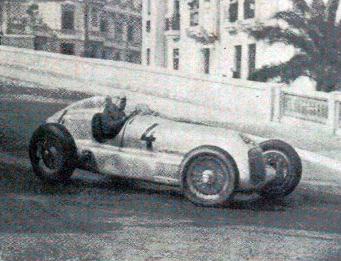 La Mercedes n°4 du vainqueur Luigi Fagioli, au Grand Prix de Monaco 1935.